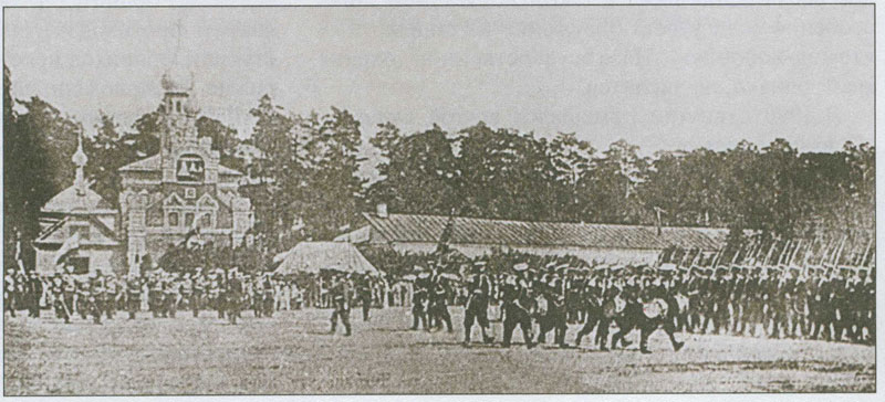 Освящение новосооруженной церкви в честь иконы Пресвятой Богородицы Скоропослушницы на Ходынском поле 1 августа 1902 года (по старому стилю). Александровское военное училище проходит церемониальным маршем перед Его Императорским Высочеством Великим Князем Сергеем Александровичем